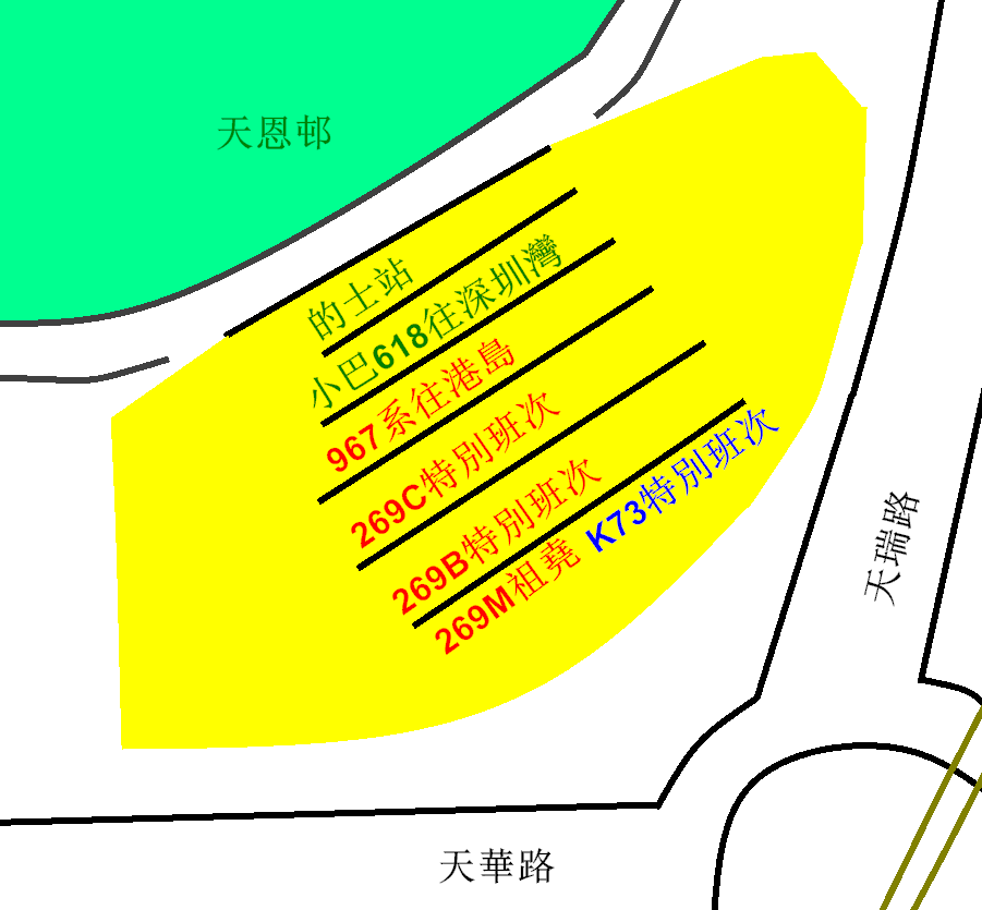 中文（香港）: 天恩邨巴士總站的平面圖